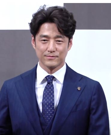 tvN 월화드라마 '60일, 지정생존자' 제작발표회가 1일 오후 서울 강남구 논현동 임피리얼팰리스서울에서 열렸다.